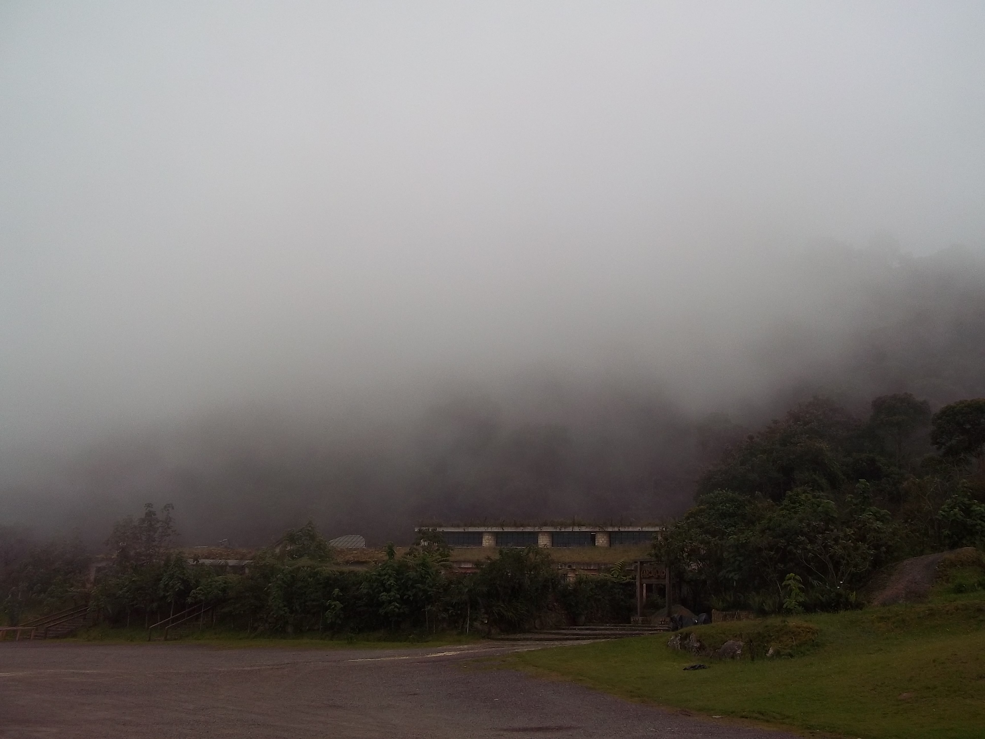 La entrada al parque Chicaque está enmarcada por un bello bosque donde la niebla cubre todo a su alrededor.